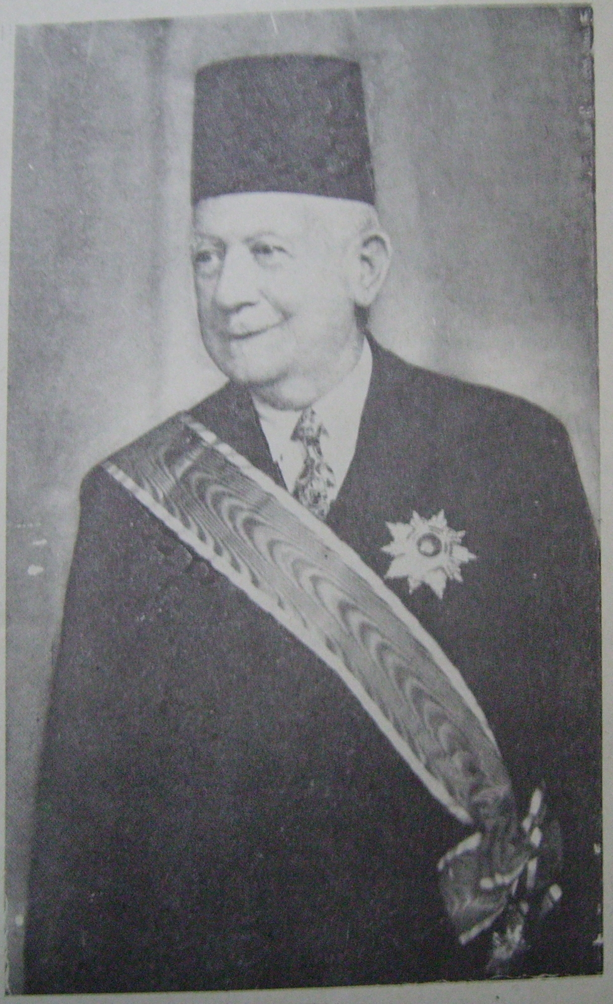 Abdul al-Rahman al-Rafai عبد الرحمن الرافعي